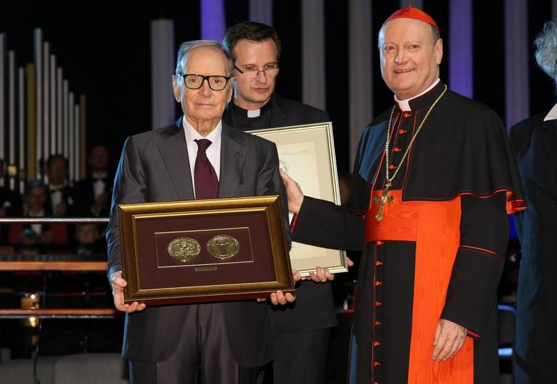 Prezydent Papieskiej Rady ds. Kultury kardynał Gianfranco Ravasi wręcza medal Per Artem Ad Deum 2012 Ennio Morricone